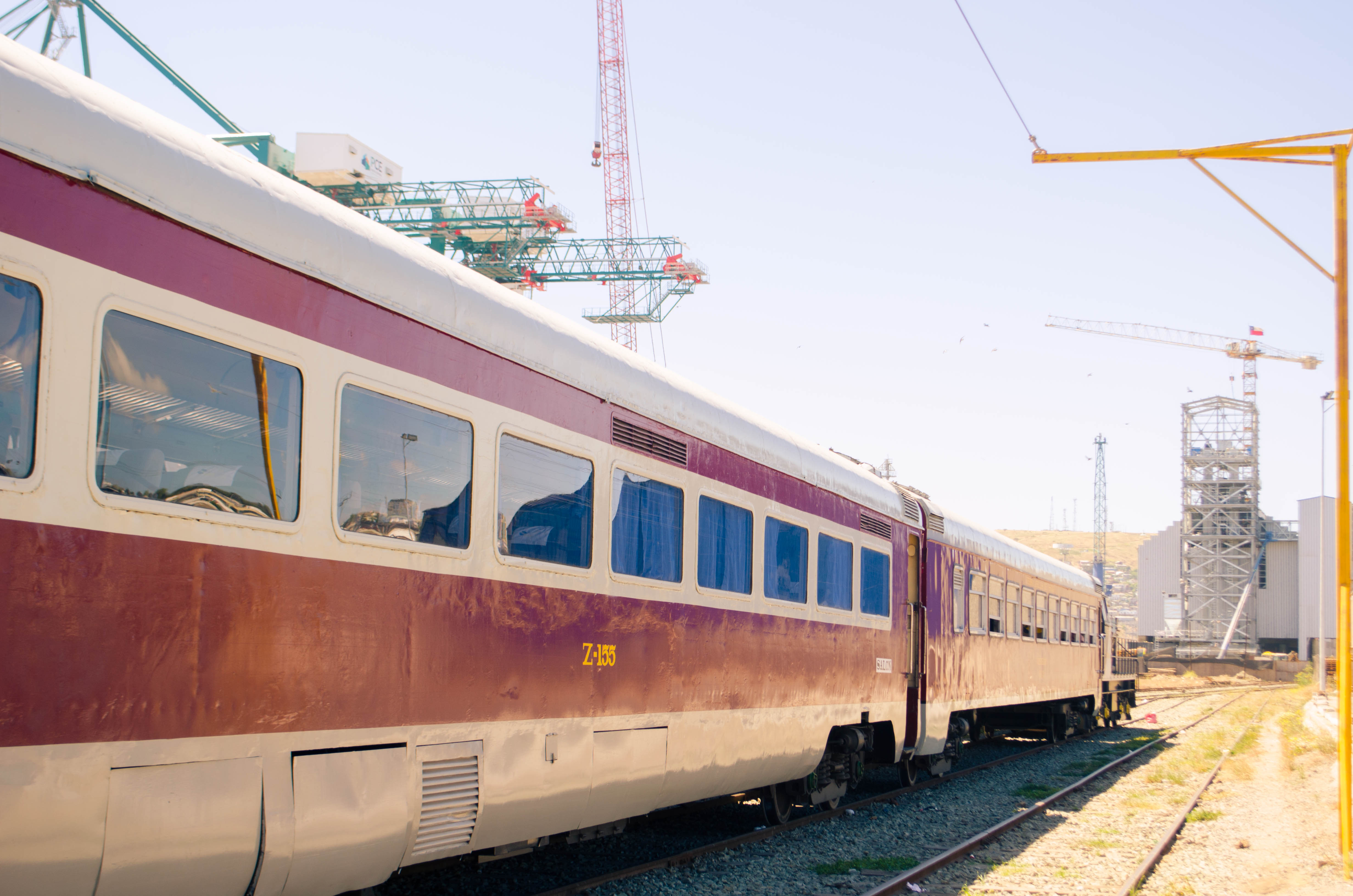 Expreso del Recuerdo en Barrancas, pueden apreciarse los coches Z-155 y el Video Bar 451.